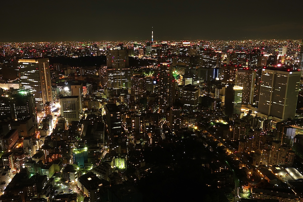 ミッドタウン・タワー52階からの眺め （夜景・東京スカイツリー側）